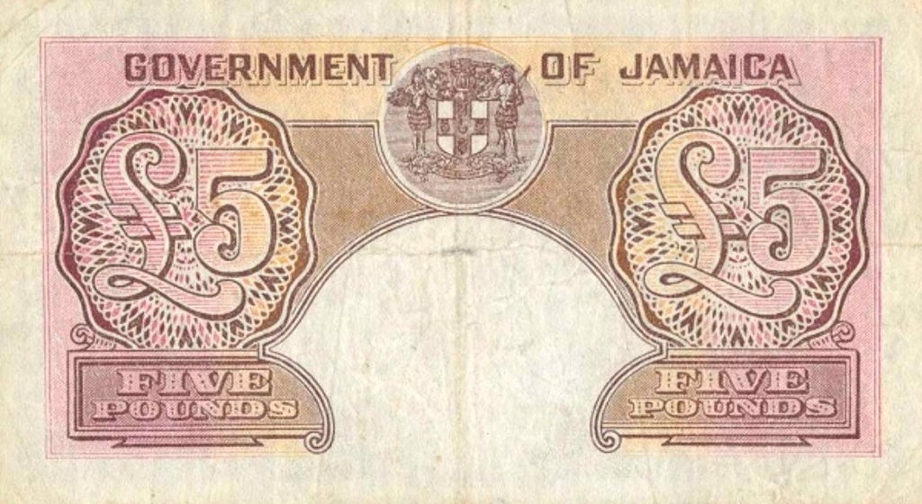 5 fontos jegy hátoldala.